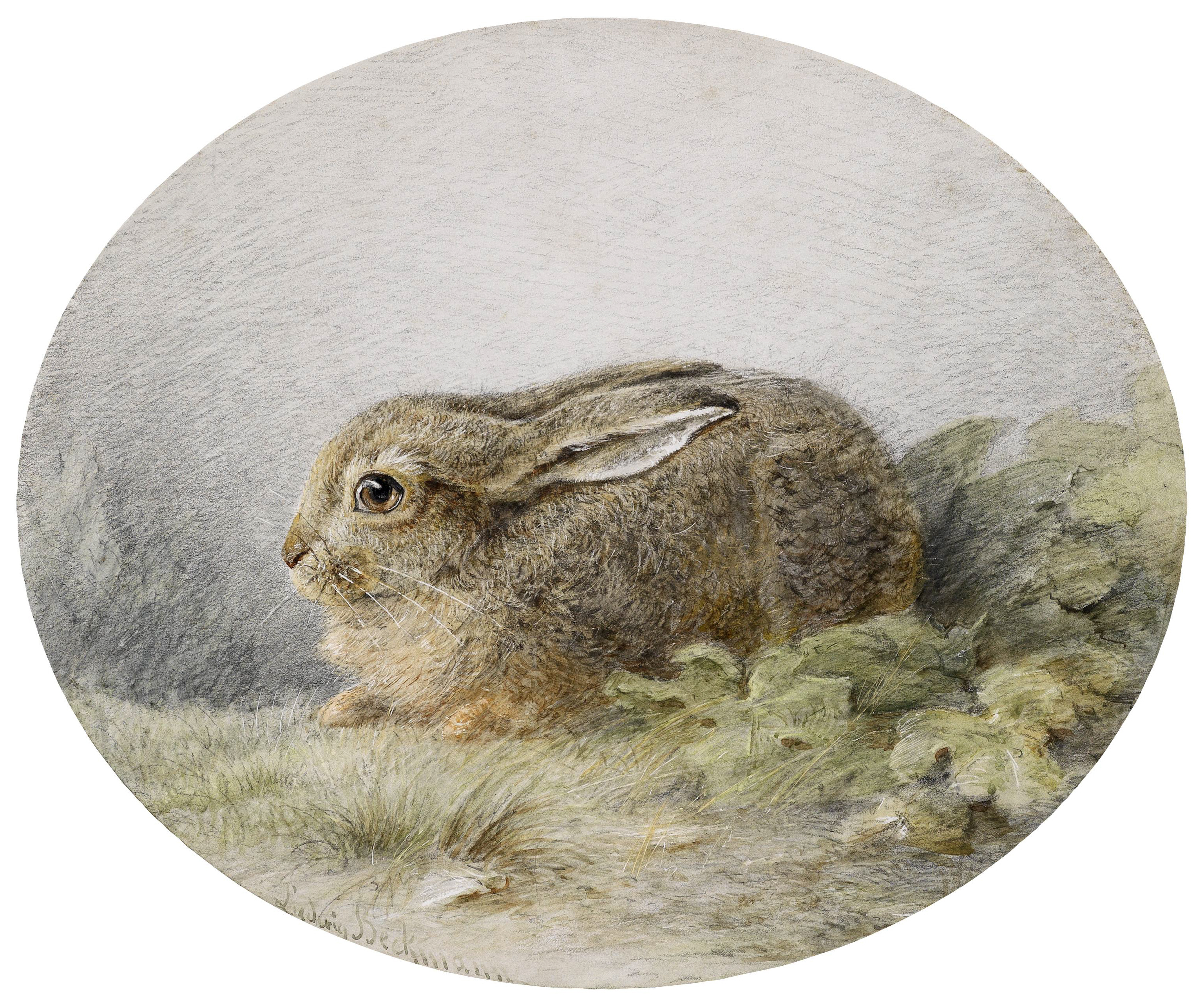 Feldhase, signiert Ludwig Beckmann, Aquarell auf Papier, 24 x 29 cm, oval